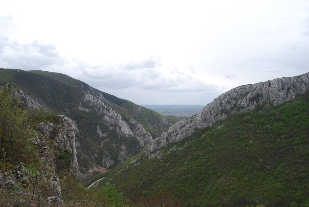 Gornjačka klisura